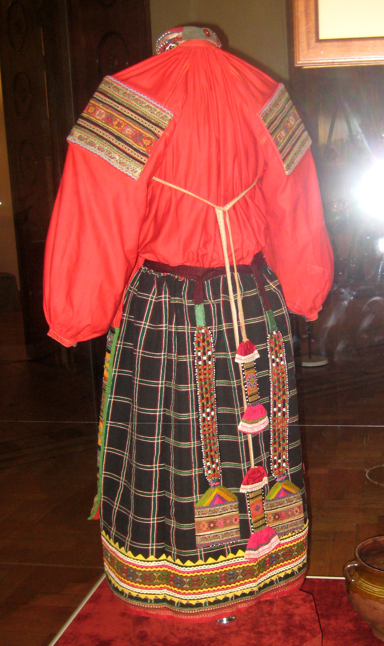 Женский костюм